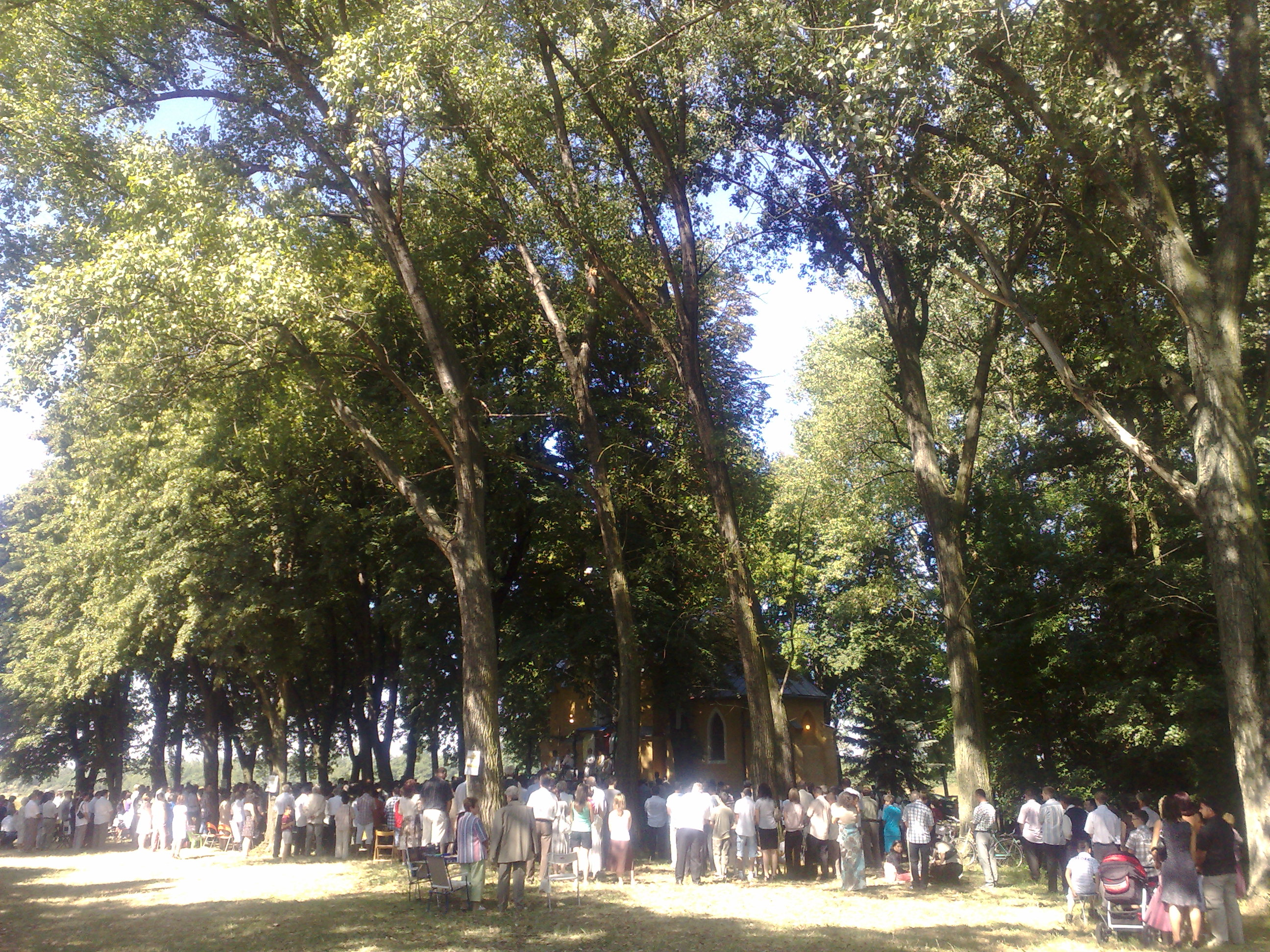 Anna-napi búcsú a szanyi Szent Anna-kápolnánál